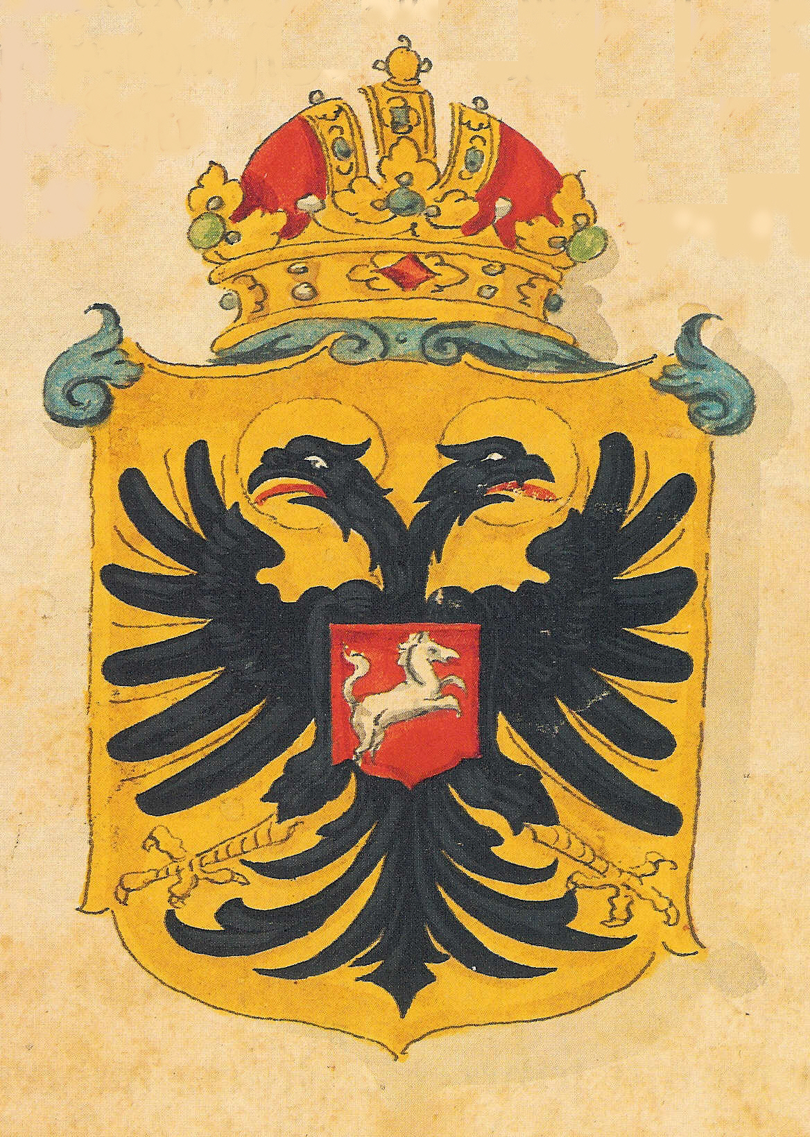 Nachträglich zugeschriebenes Sachsenross-Wappen von König Heinrich I. aus dem sächsischen Geschlecht der Liudolfinger, 10. Jahrhundert, Malerei aus einem Turnierbuch der Kraichgauer Ritterschaft (Codex Rossianus 711 im Besitz der Biblioteca Apostolica Vaticana) von ca. 1615, Rechte abgelaufen, PUBLIC DOMAIN